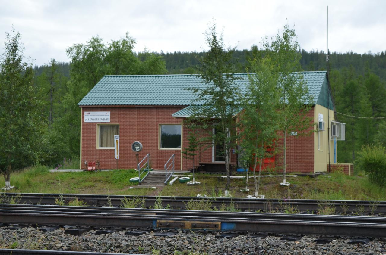 Нерюнгри. Ж/д станция Нерюнгри-Грузовая